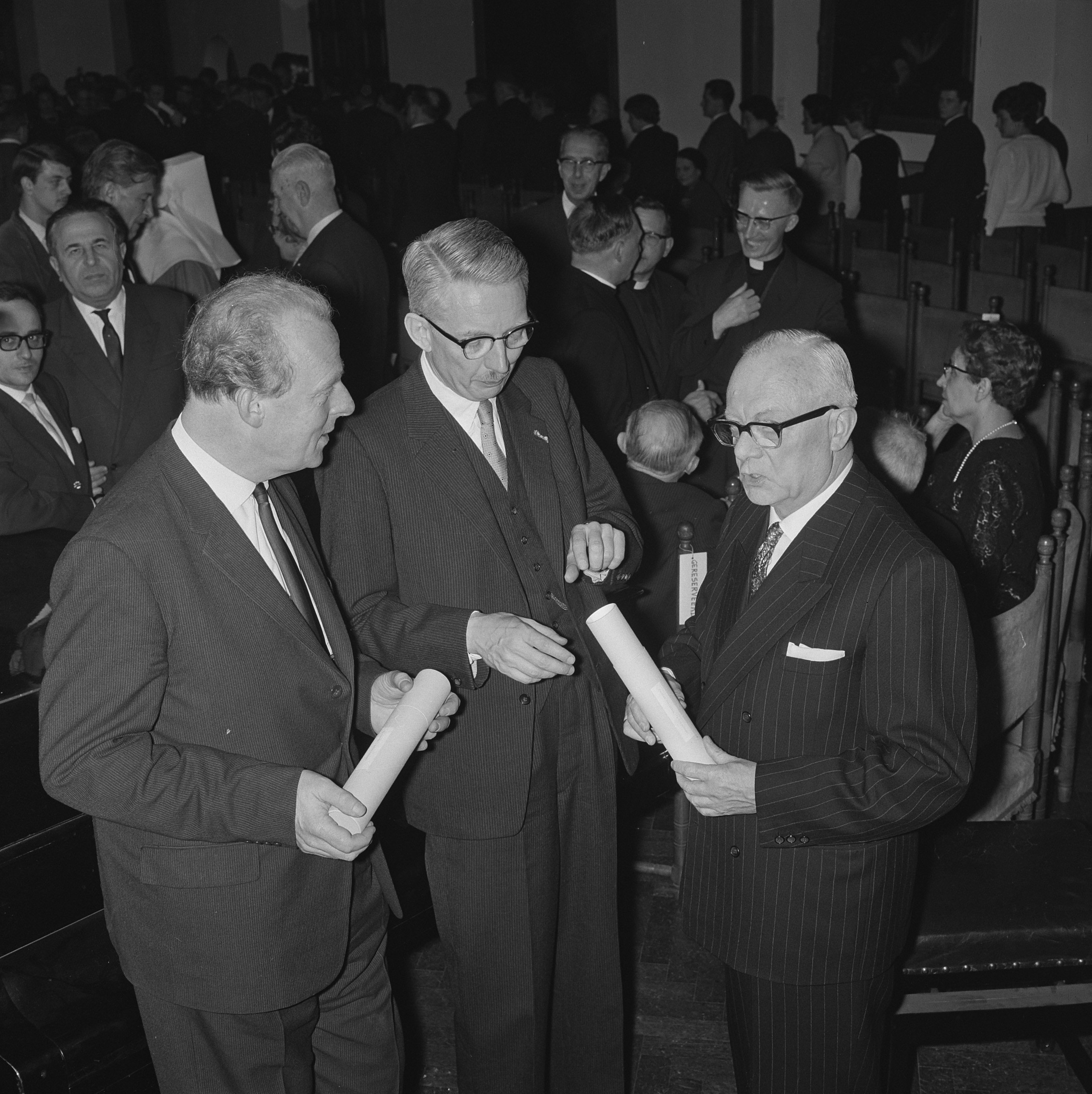 Uitreiking ANV-Visser Neerlandiaprijzen 1964. Haagse Rolzaal twee bekende muziekkunstenaars Gerard Hengeveld (l) en Hans Henkemans (m) kregen prijs van de voorzitter van ANV-VN, Frans Koote. Datum 15 februari 1964